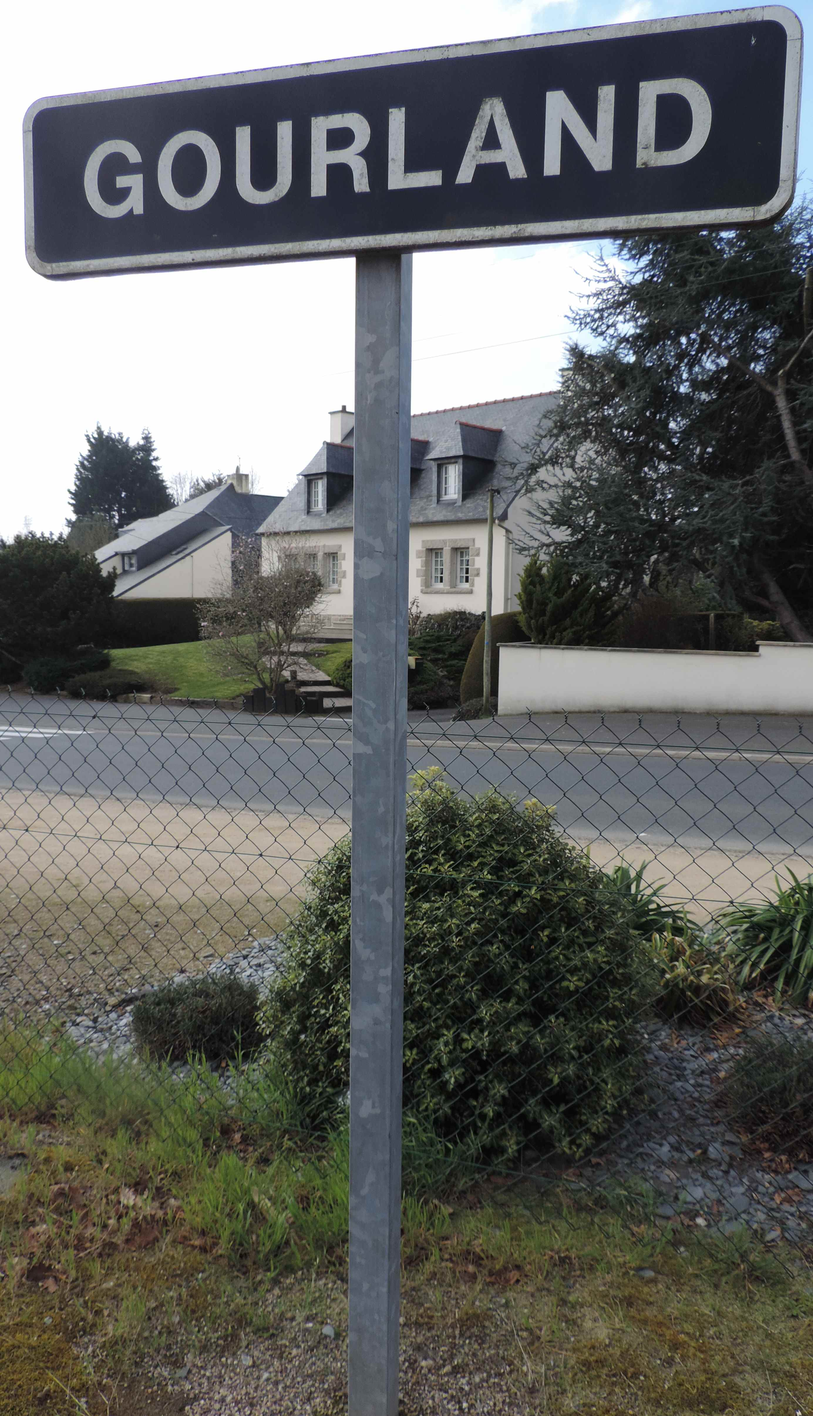 Panneau de la halte de Gourland.